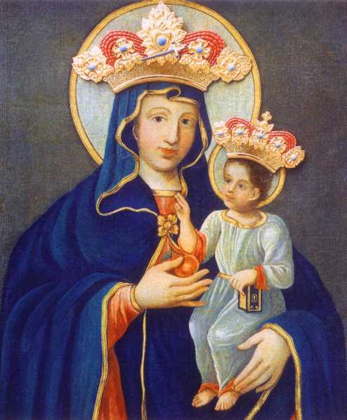 Matka Boska Piekarska - Piekary Śląskie (Polska, Poland)